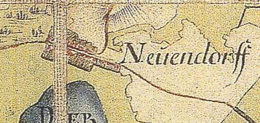 Nächst Neuendorf, Stadt Zossen, Brandenburg, Deutschland, Ausschnitt aus der Schmettau'schen Karte von 1767-87